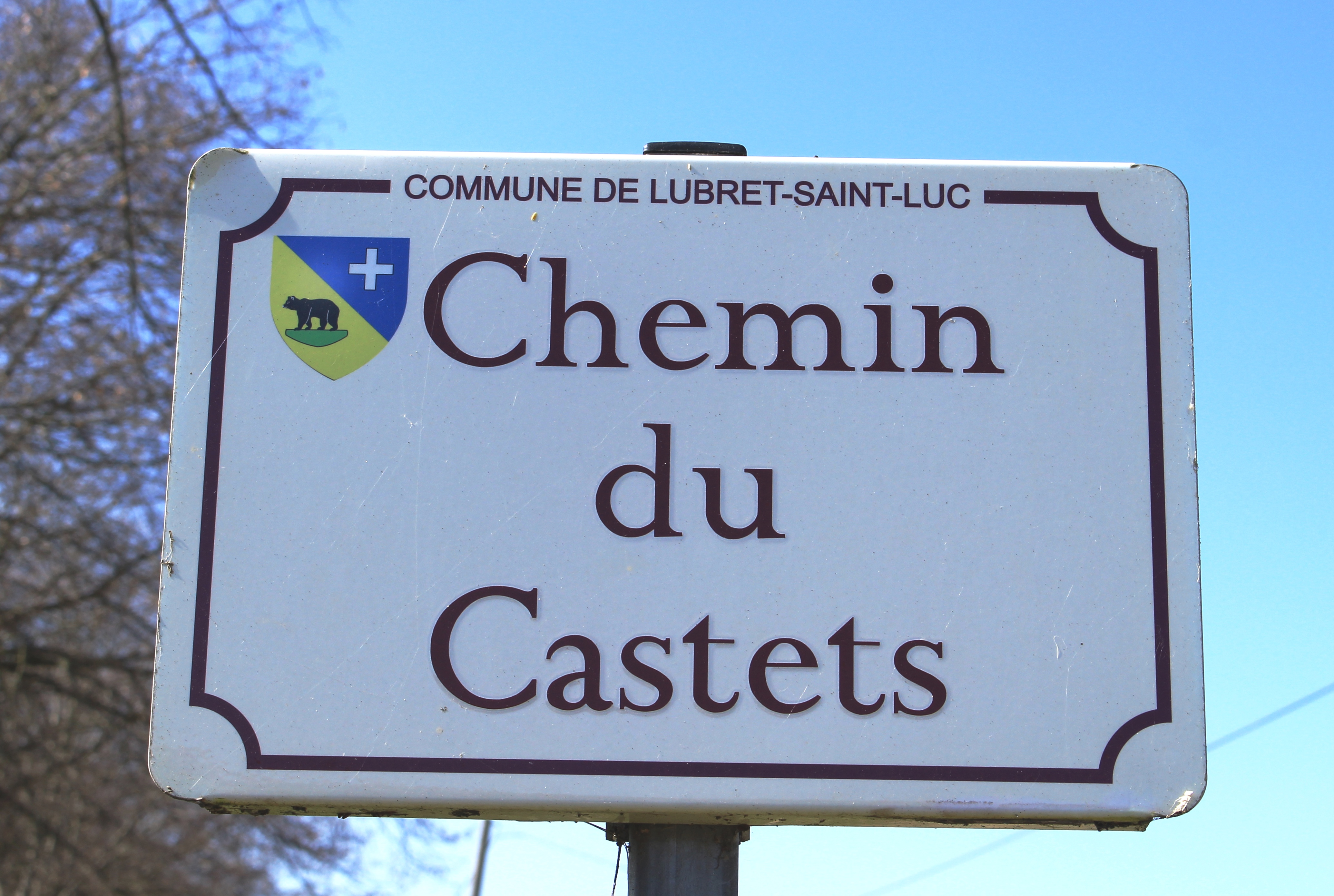 Rue du village de Lubret-Saint-Luc (Hautes-Pyrénées)